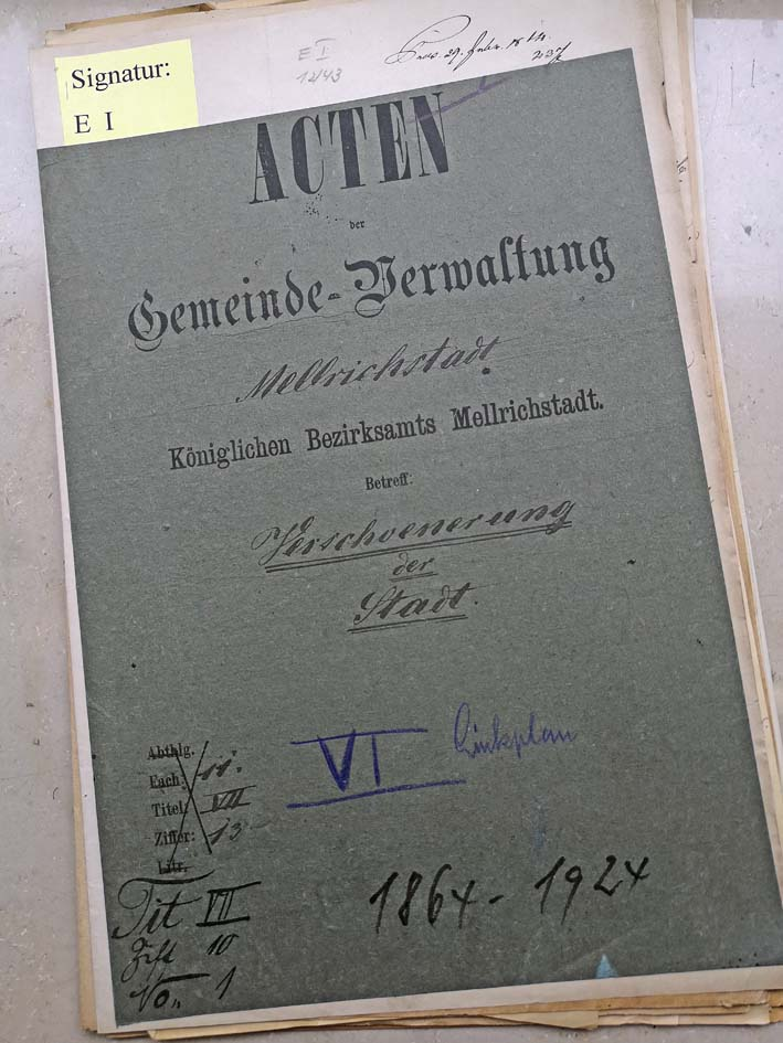 Akten zur Stadtverschönerung 1864-1924 im Stadtarchiv Mellrichstadt